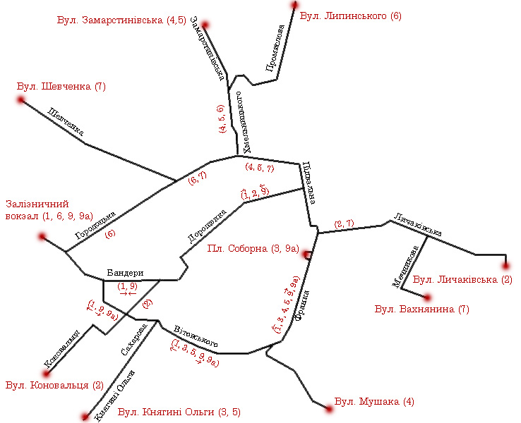 Схема маршрутів львівського трамваю